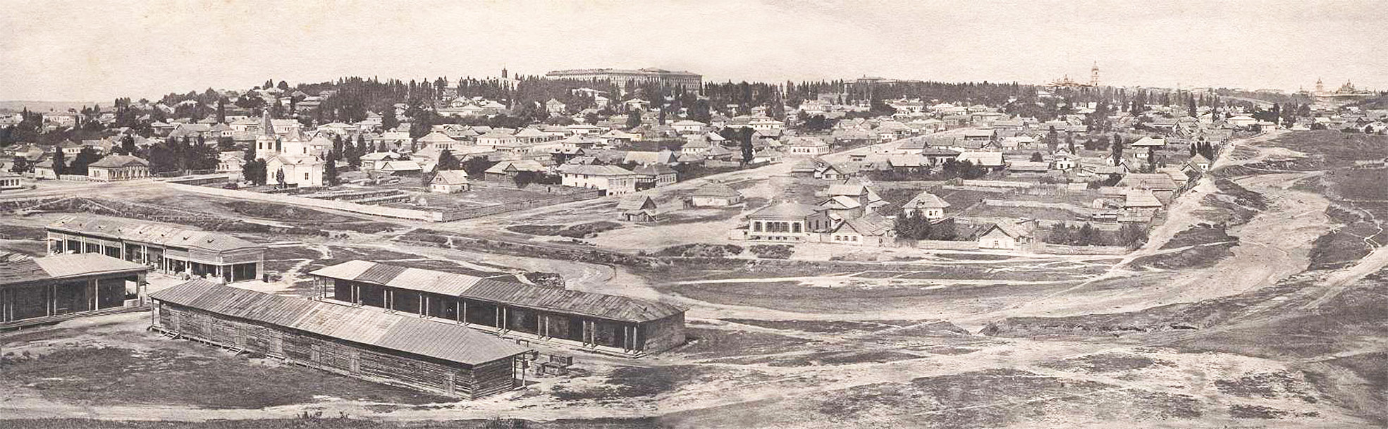 Нова забудова. Київ